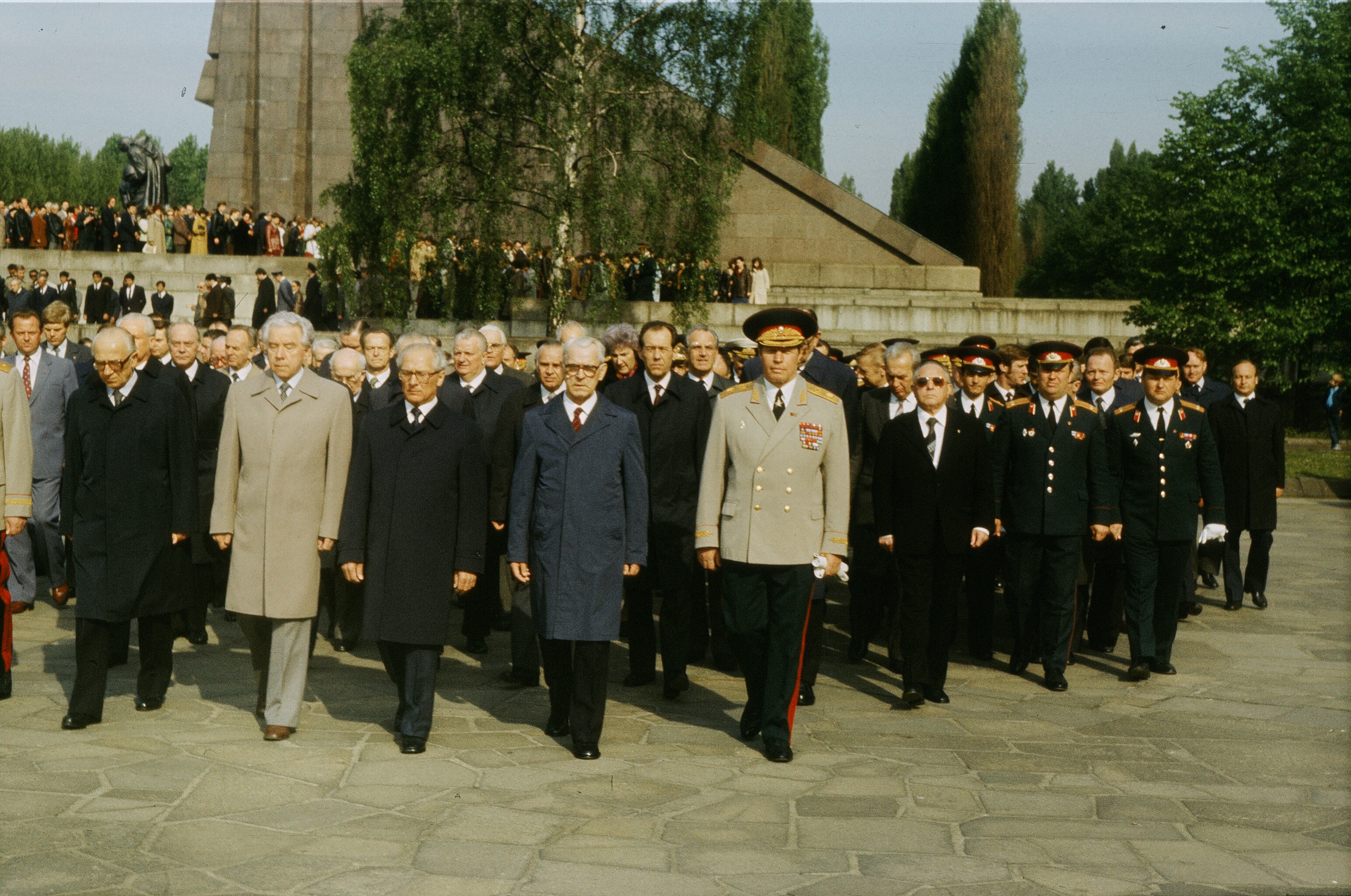 Руководство ГДР , Посол СССР в ГДР П.А. Абрасимов и Главком ГСВГ генерал армии М.М. Зайцев на возложении венков . Берлин Трептов-Парк 8 мая 1982 года.